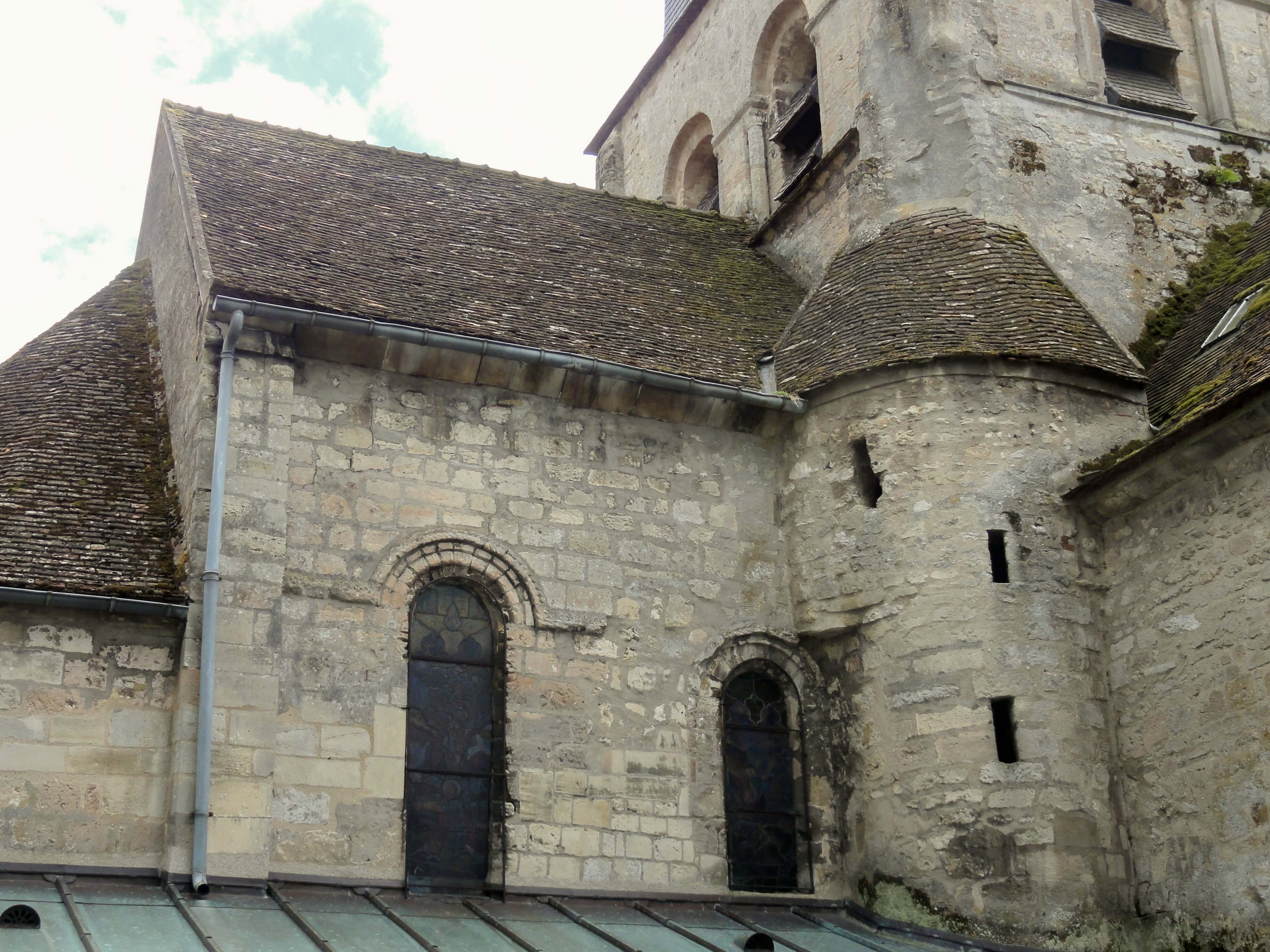 Chœur, côté nord : les fenêtres d'origine subsistent ici.